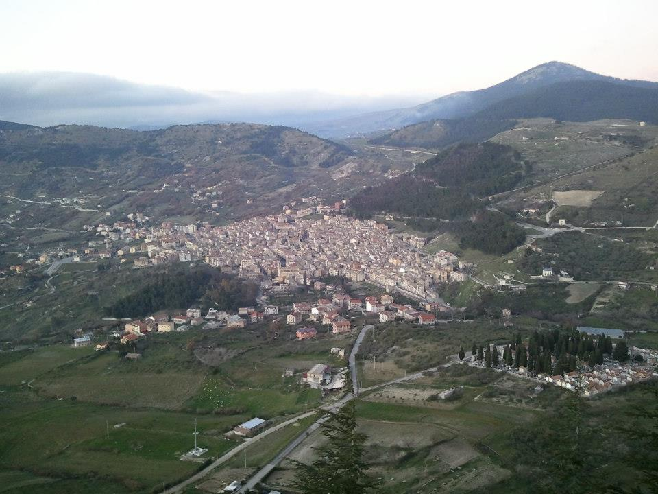 Panorama del paese